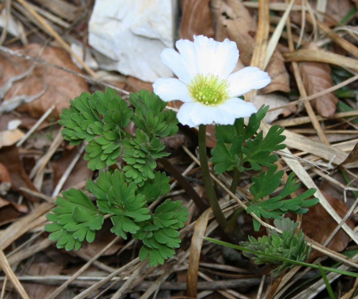 Windröschen-Schmuckblümchen (Callianthemum anemonoides), Hahnenfußgewächse (Ranunculaceae) - Österreich/Austria/Autriche: Steiermark, Ennstaler Alpen, Spitzenbachgraben W St. Gallen